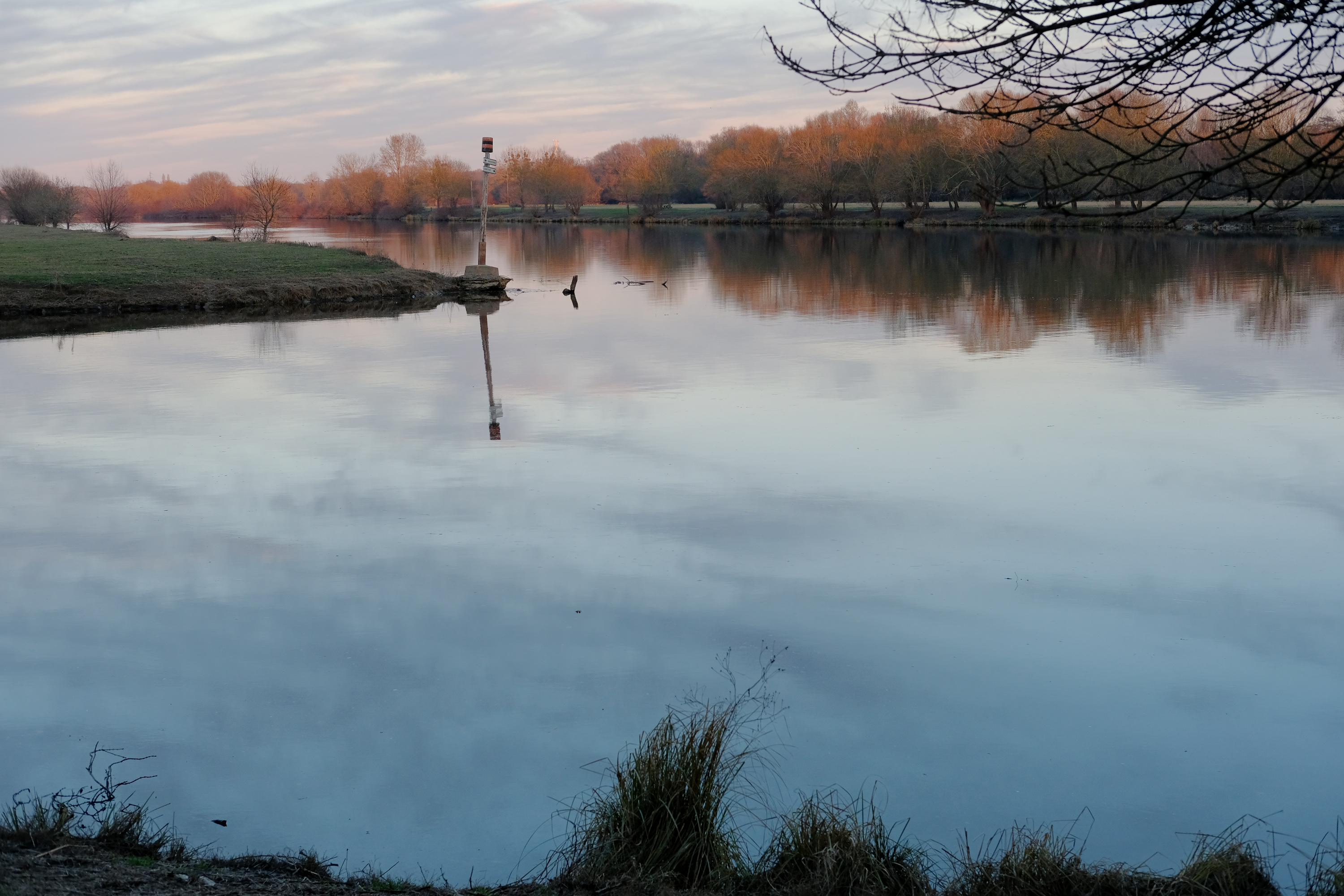 Confluence de la Sarthe (en arrière plan) et de la Mayenne (à gauche, premier plan) pour former la Maine (à droite) ; on perçoit également la pointe de l'île Sain-Aubin entre la Sarthe et la Mayenne.